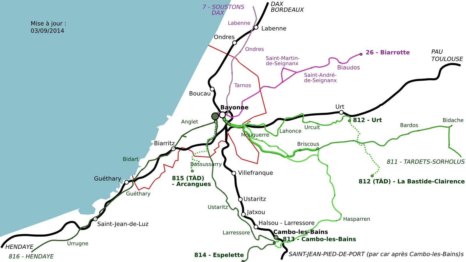 Version PNG de File:Transport interurbain autour de Bayonne.svg. Mise à jour 03/09/2014.